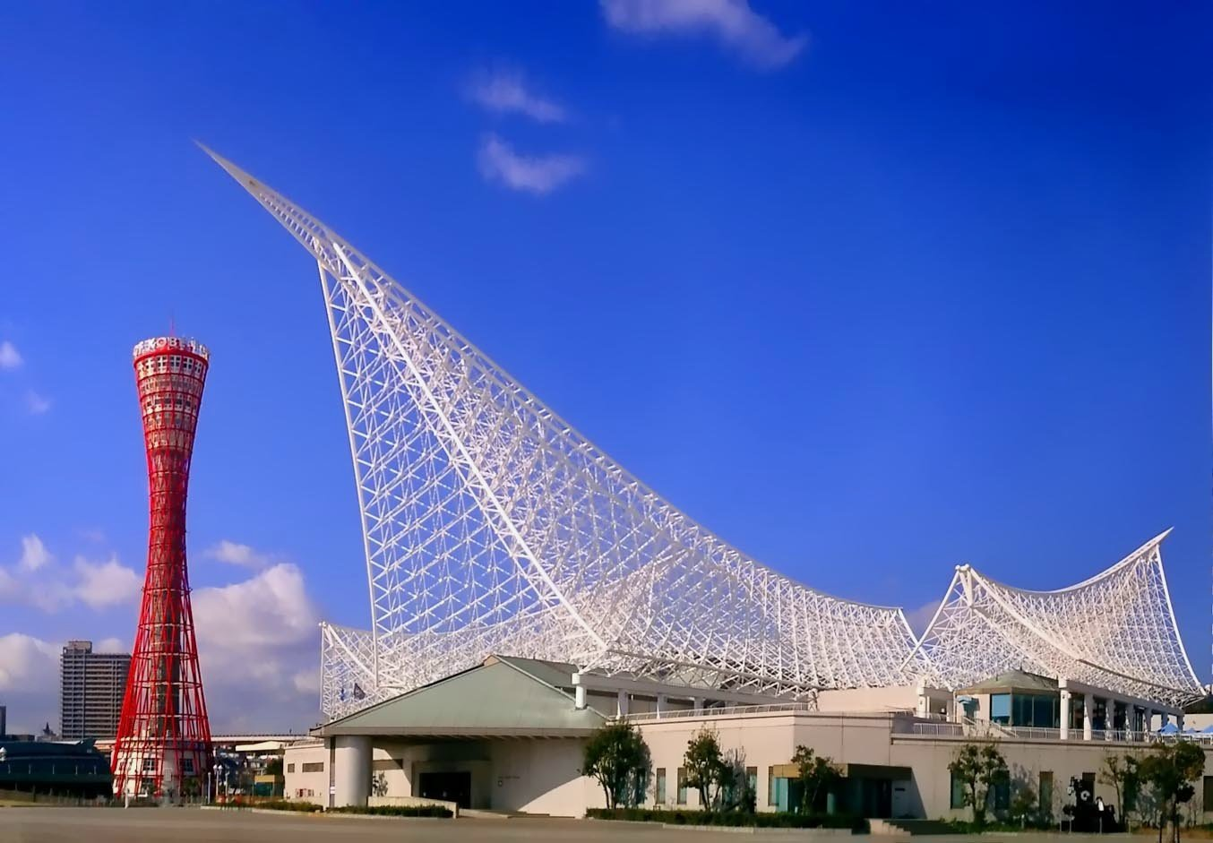 Kobe_maritime_museum